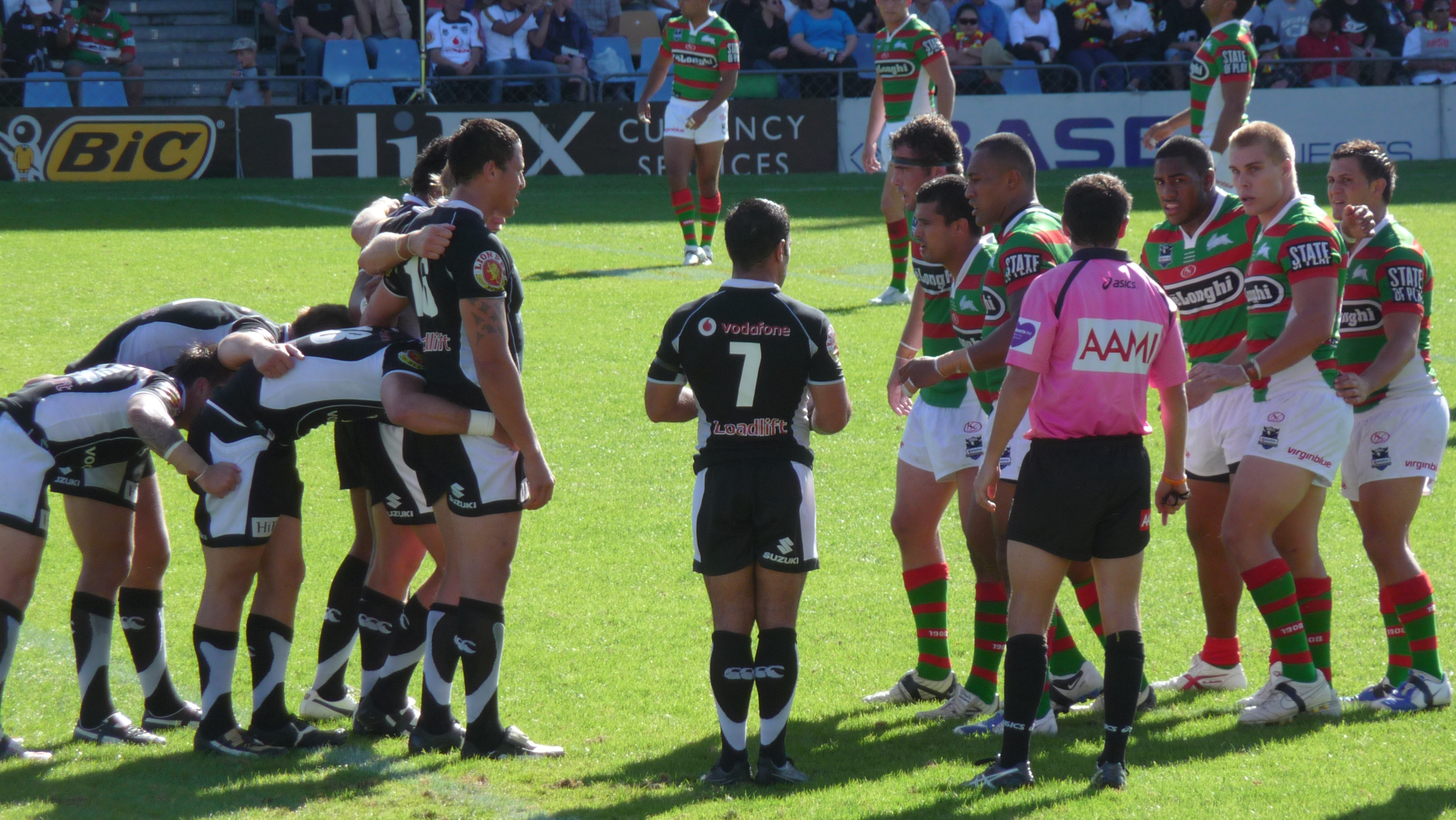 Warriors v Bunnies